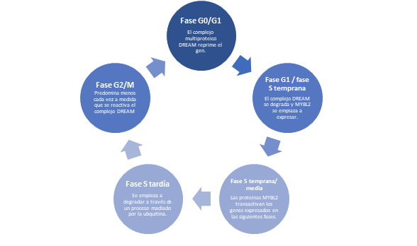 Podemos observar como se encuentra el gen y sus proteínas en cada fase del ciclo celular.